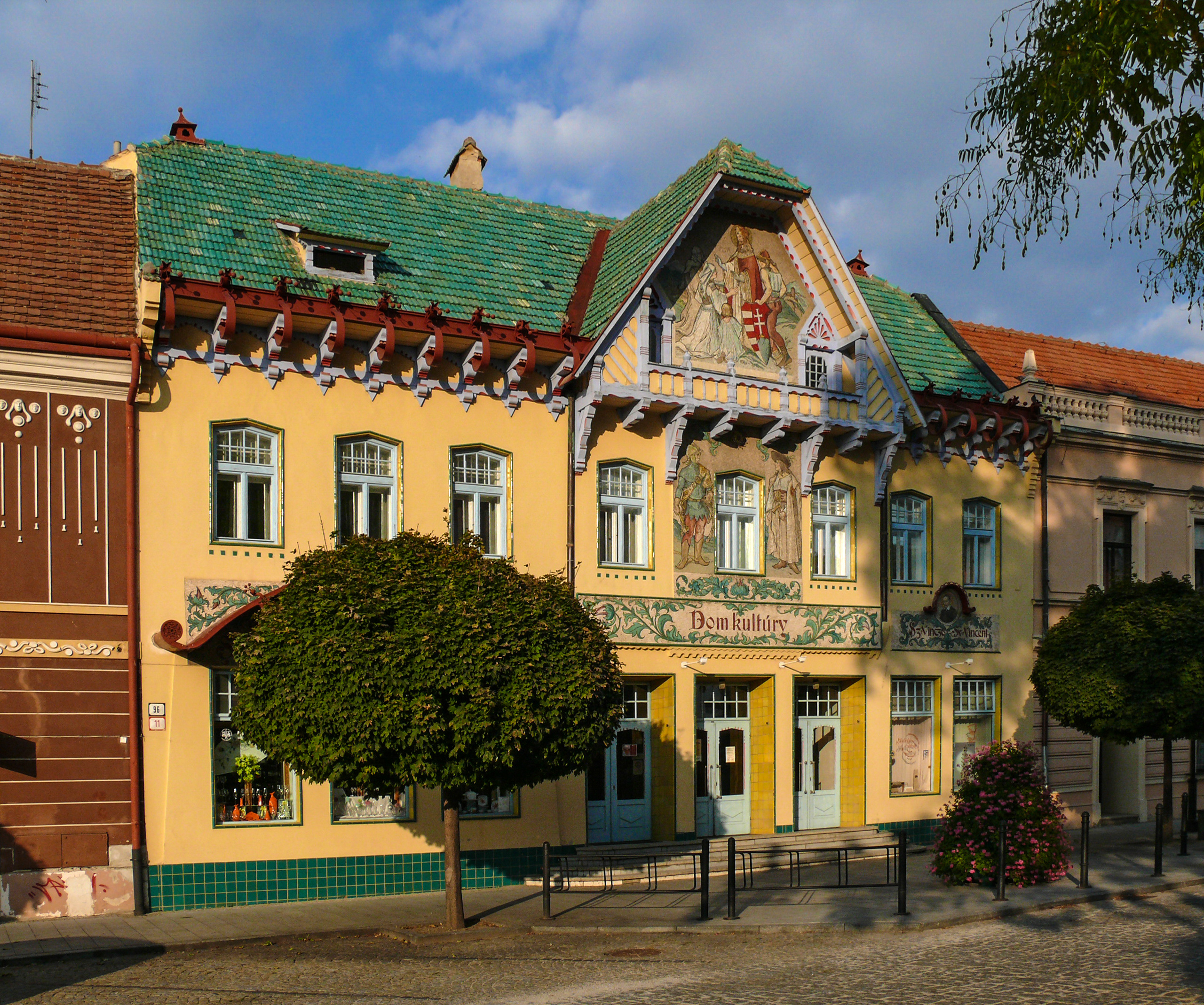 Skalica, Spolkový dom. Architekt: Dušan Jurkovič, 1904-1905.